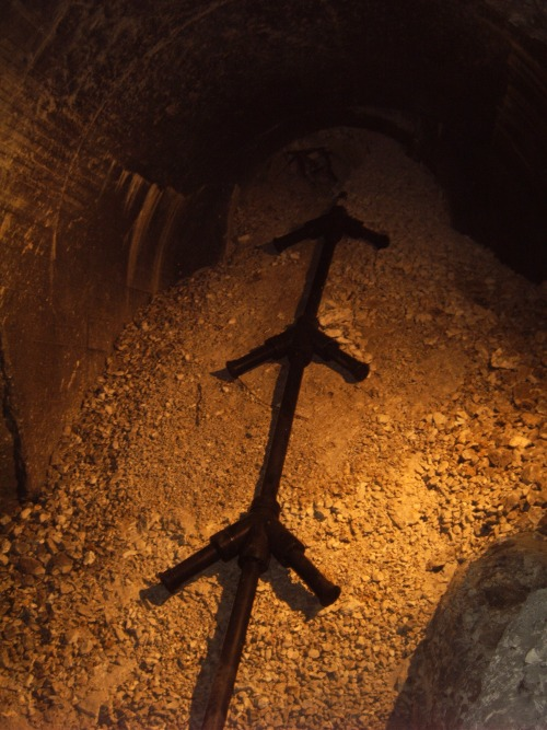 portion d'un canon V3 de la forteresse de Mimoyecques